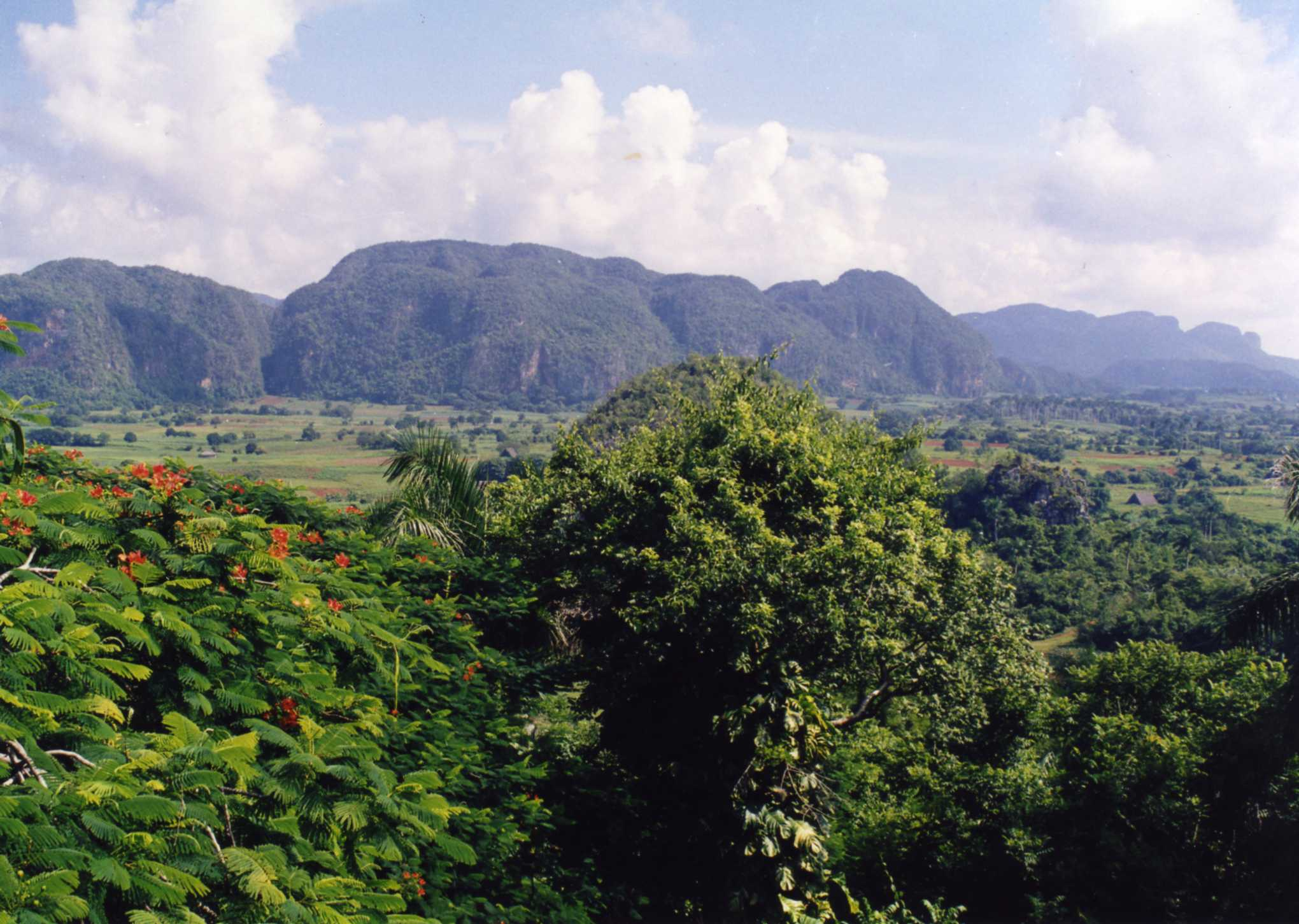 Valle de Viñales (Cuba)